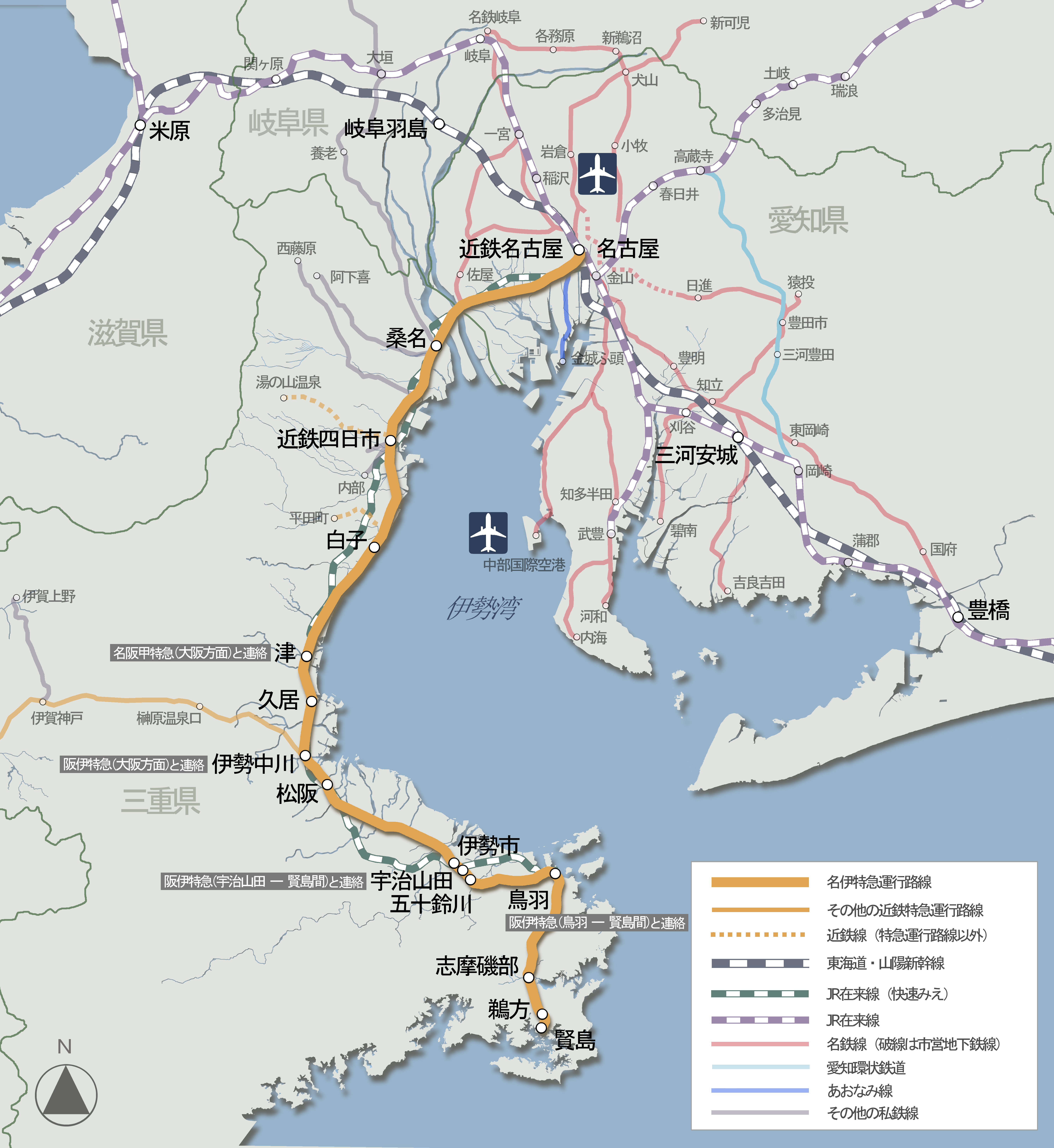 近鉄名伊特急ルートマップ